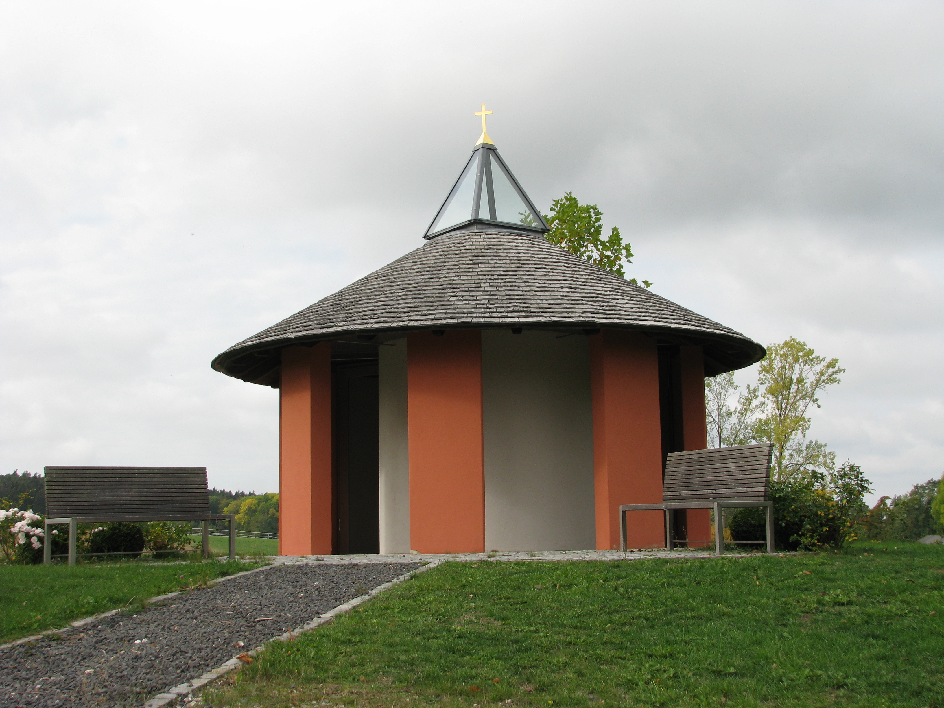 Rudletzholz, Gemeindeteil von Heideck im mittelfränkischen Landkreis Roth, Dreifaltigkeitskapelle von 2007